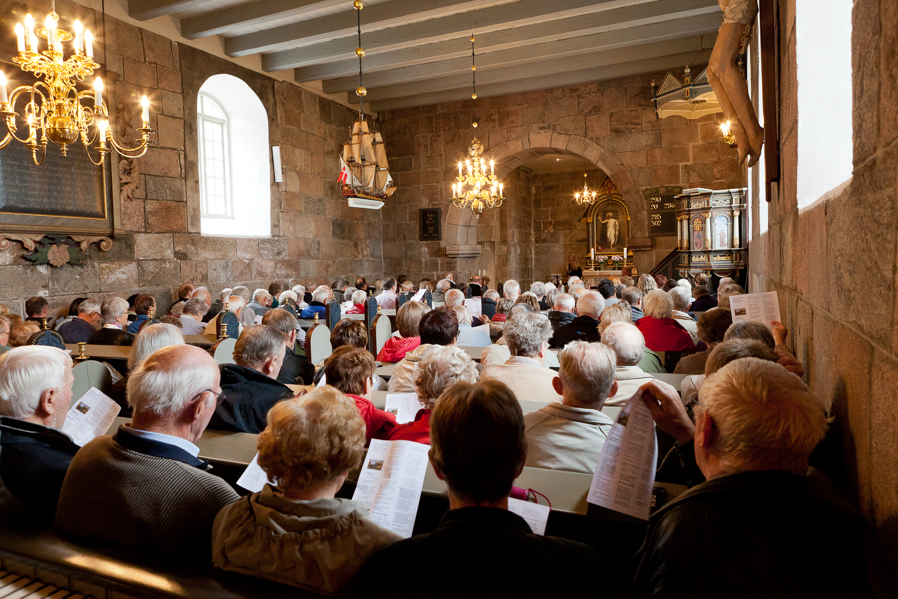 Gudstjeneste i Nors Kirke, Nors Sogn ved Thisted.